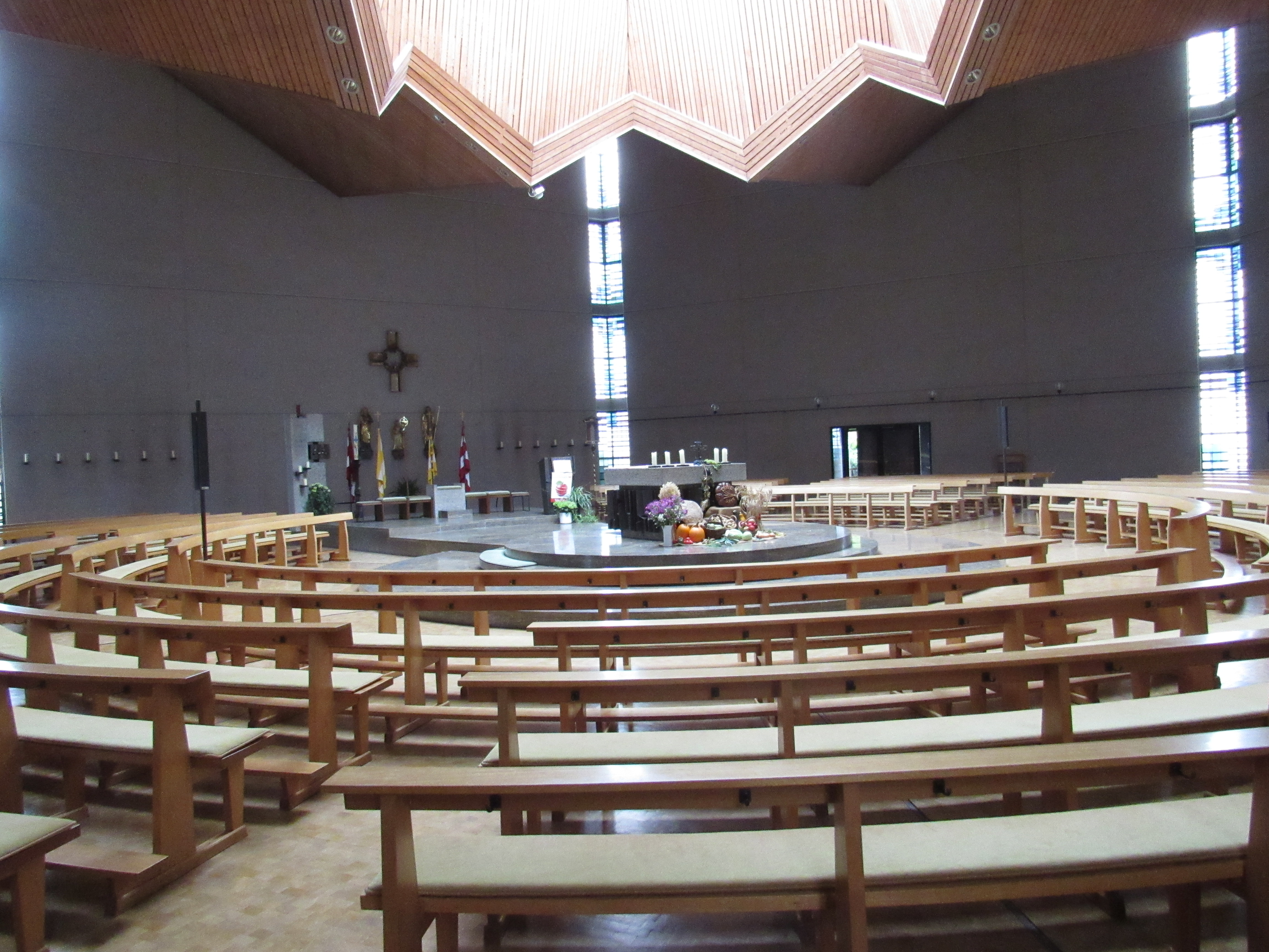 Oerlenbach St. Burkard innen